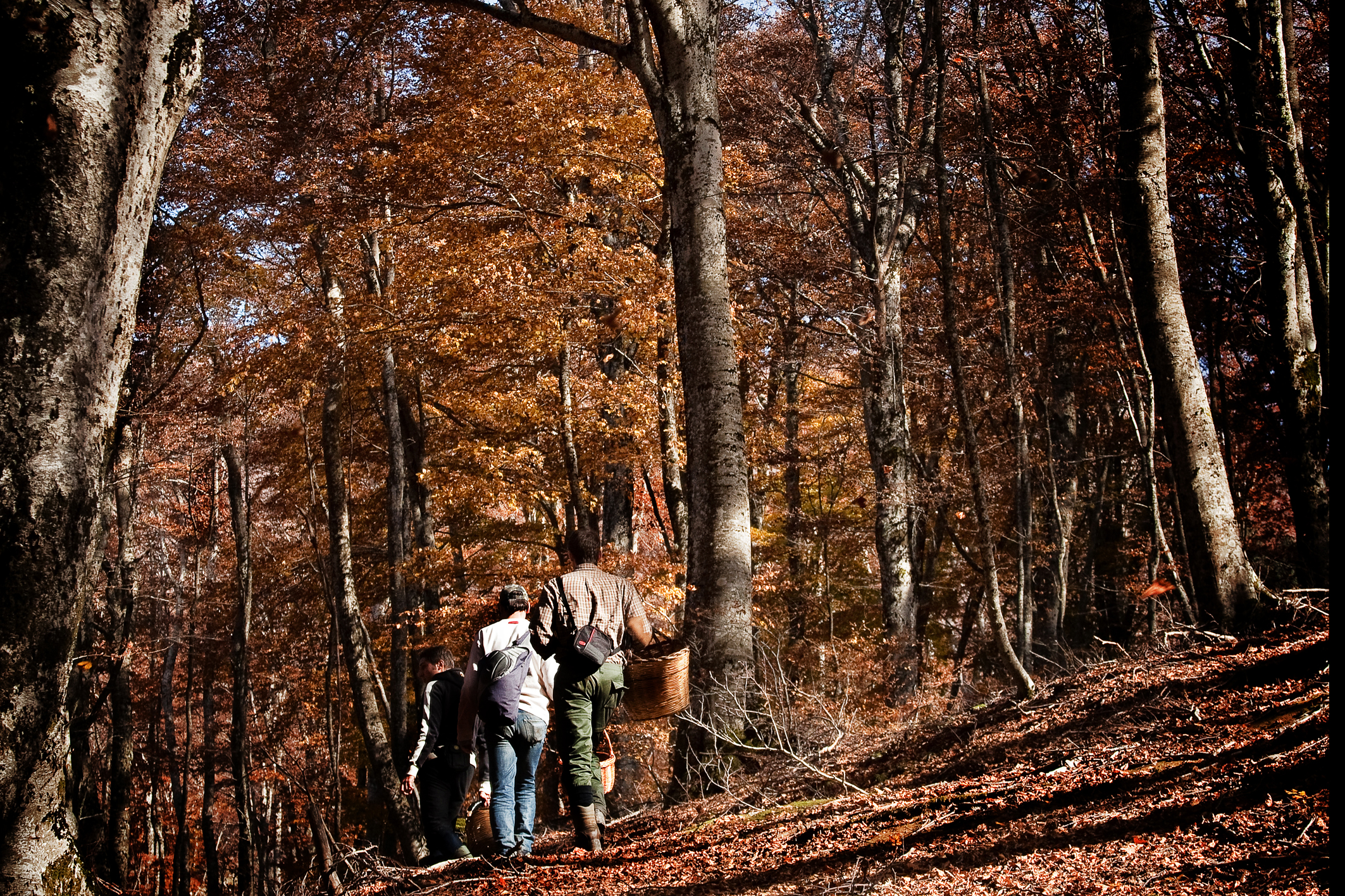 boschi di faggio